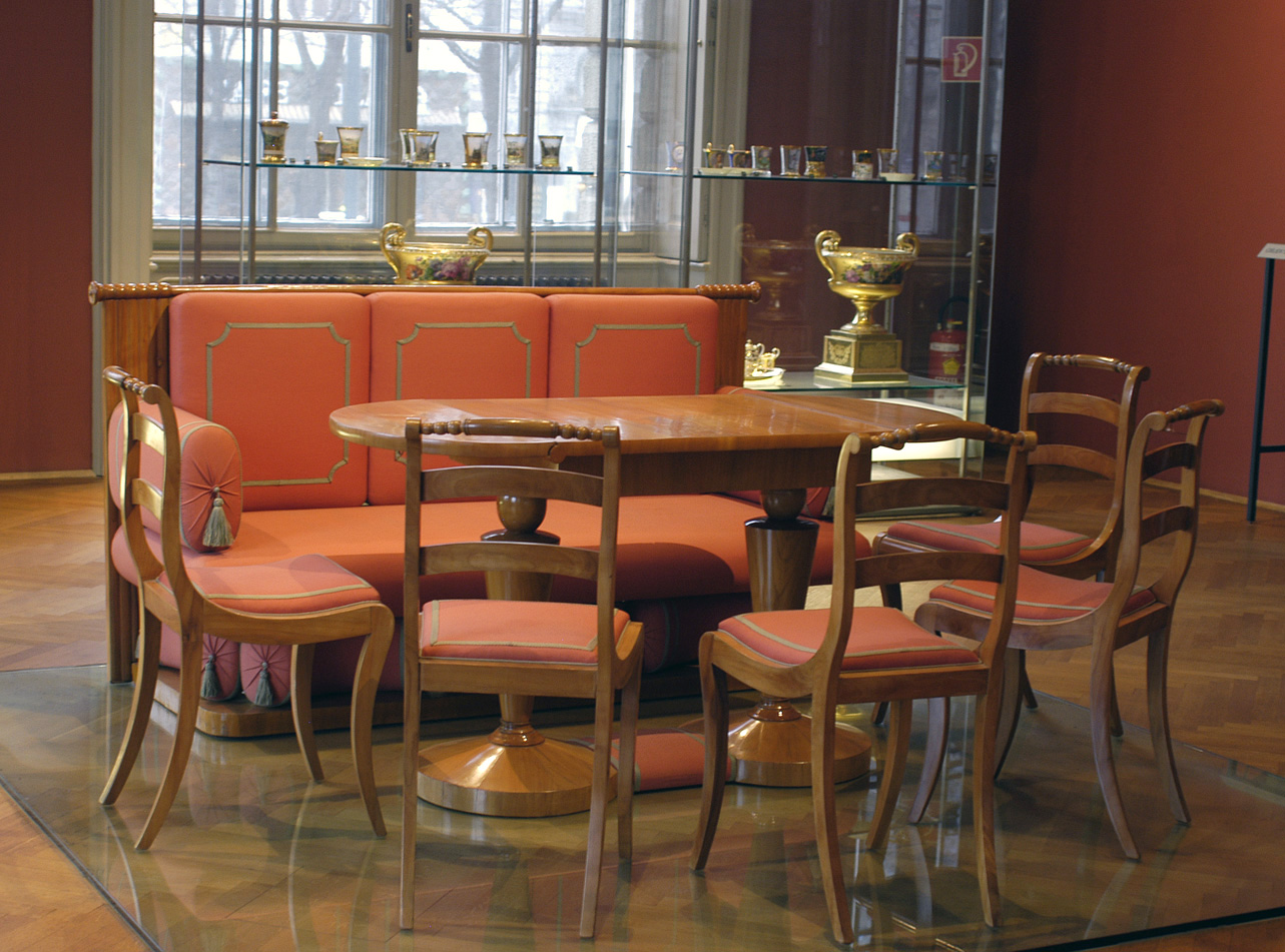 Sitzgarnitur bestehend aus Kanapee Modell N° 57, Sessel Modell N° 122 und Teetisch Modell N° 31, Danhauser'scher Möbelfabrik, Wien um 1825/30